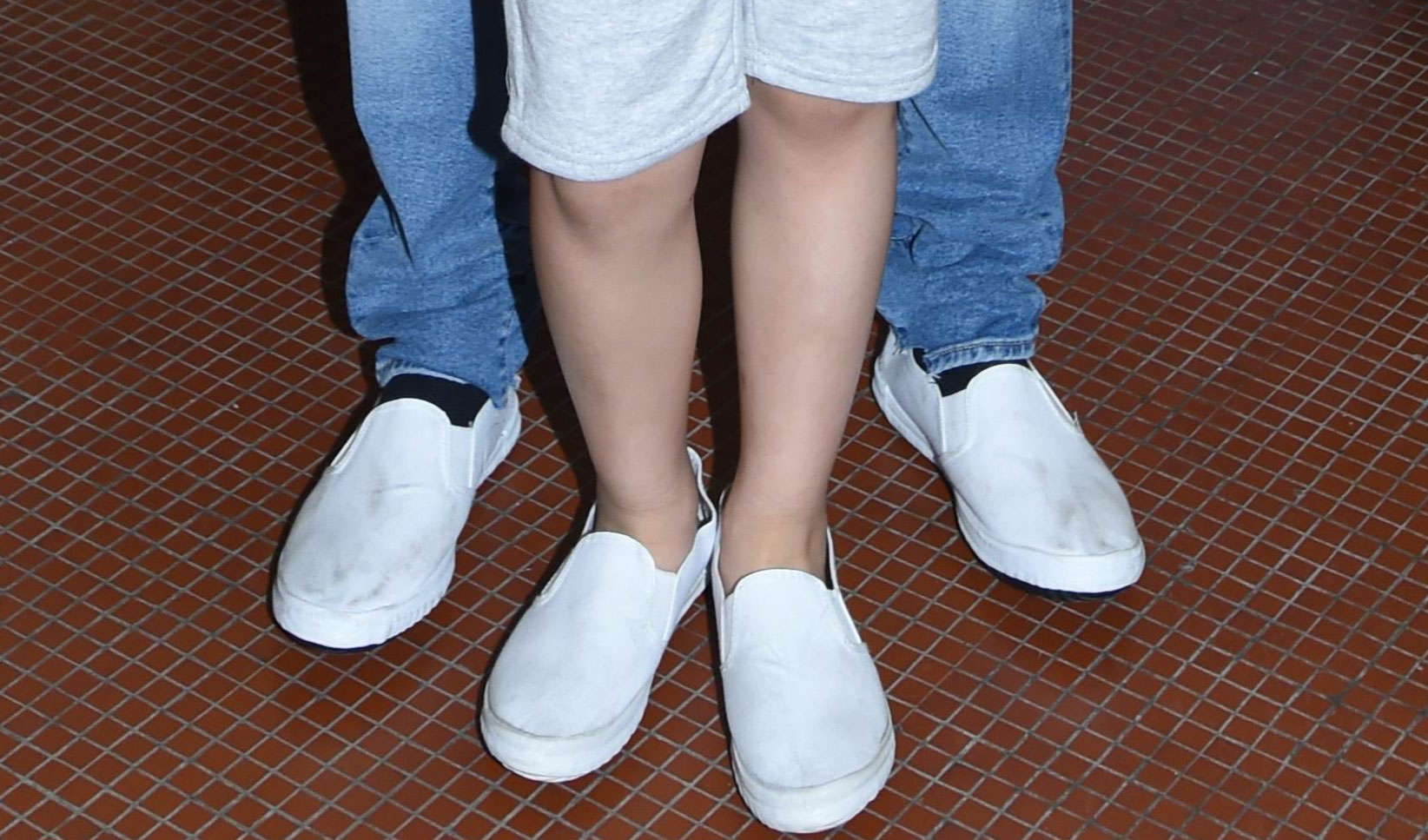 白飯魚鞋